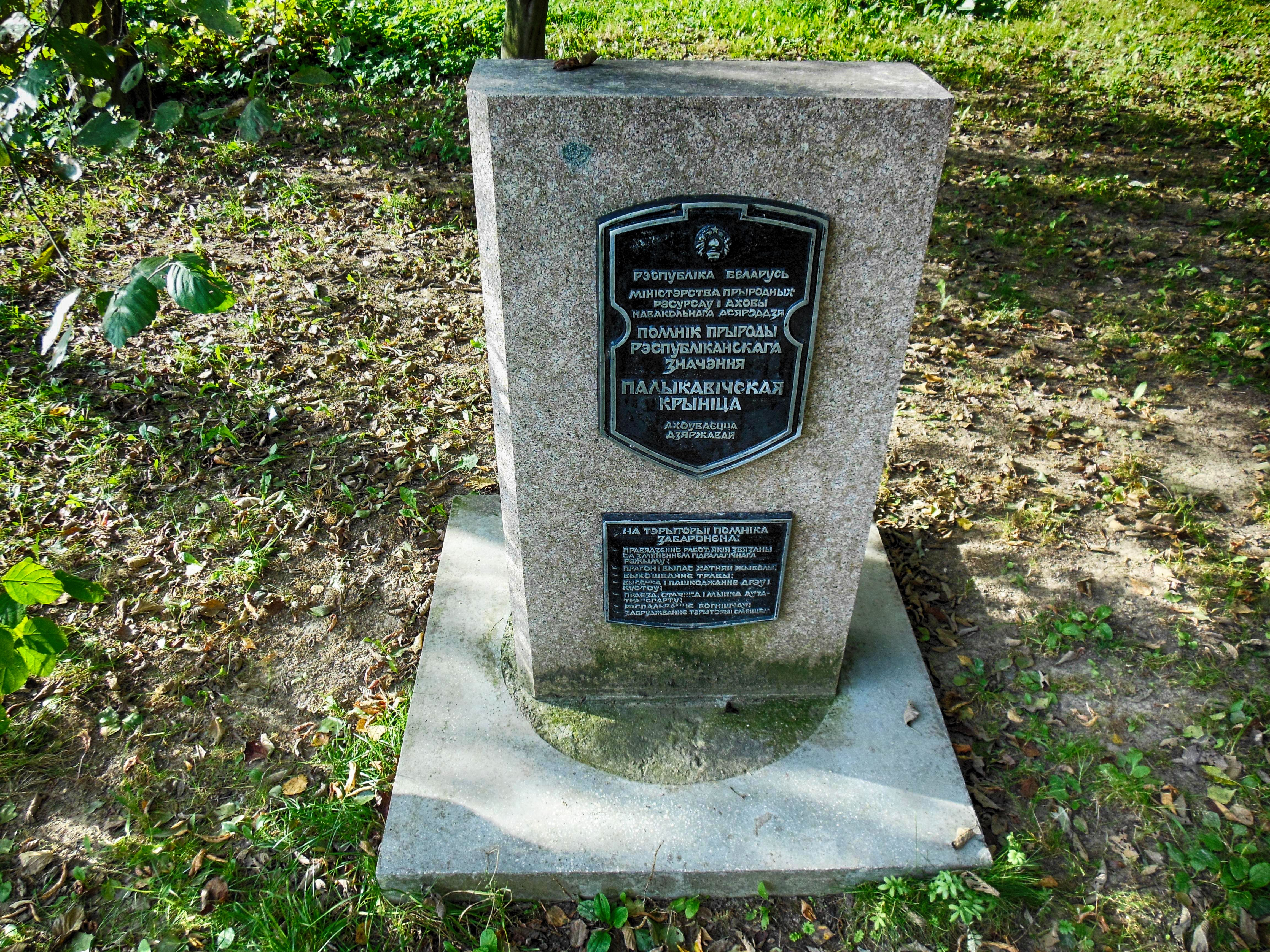 Беларуская (тарашкевіца): Палыкавічы, крыніца